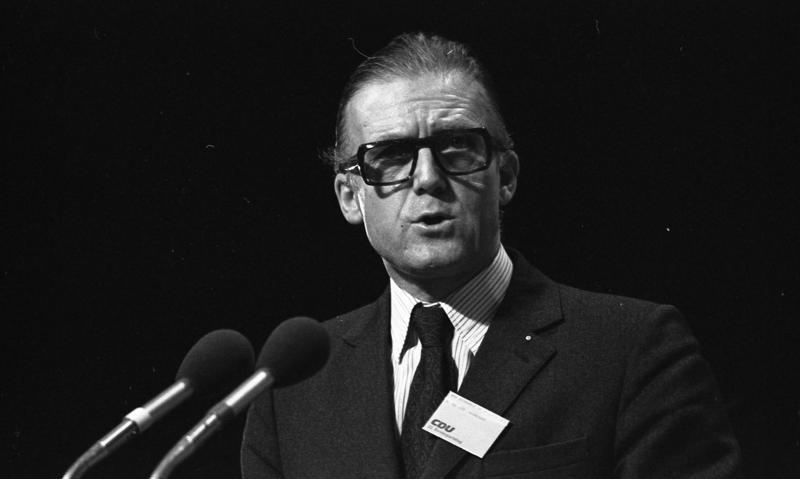 22. Bundesparteitag der CDU in Hamburg (MdB Philipp von Bismarck) 18.-20.11.1973